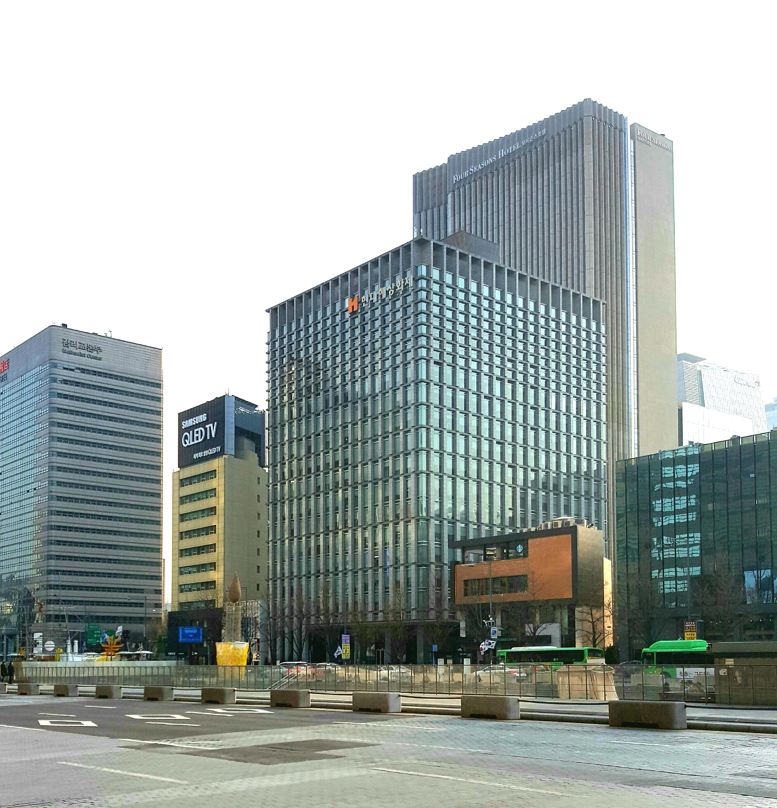 현대해상빌딩 (가운데, 서울특별시 종로구 광화문광장 인근 위치)